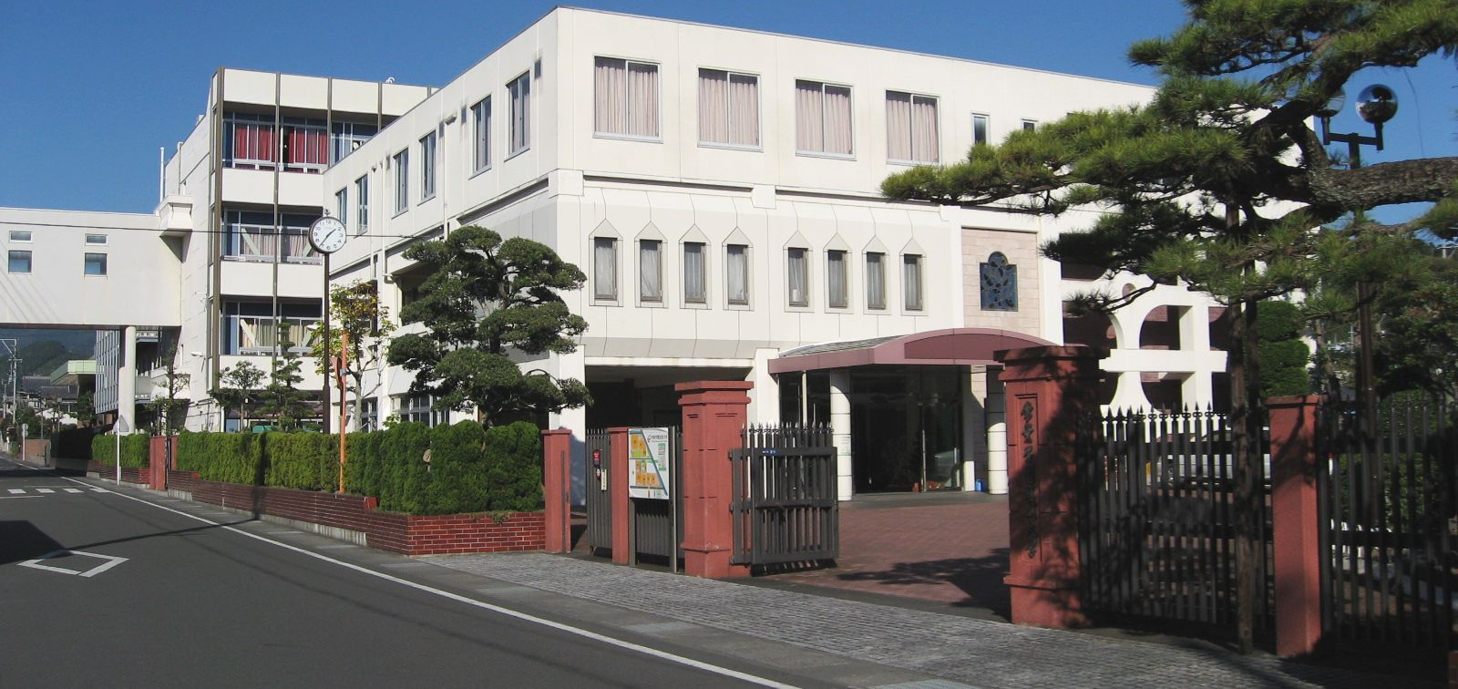 Tokoha Junior College, Shizuoka, Japan